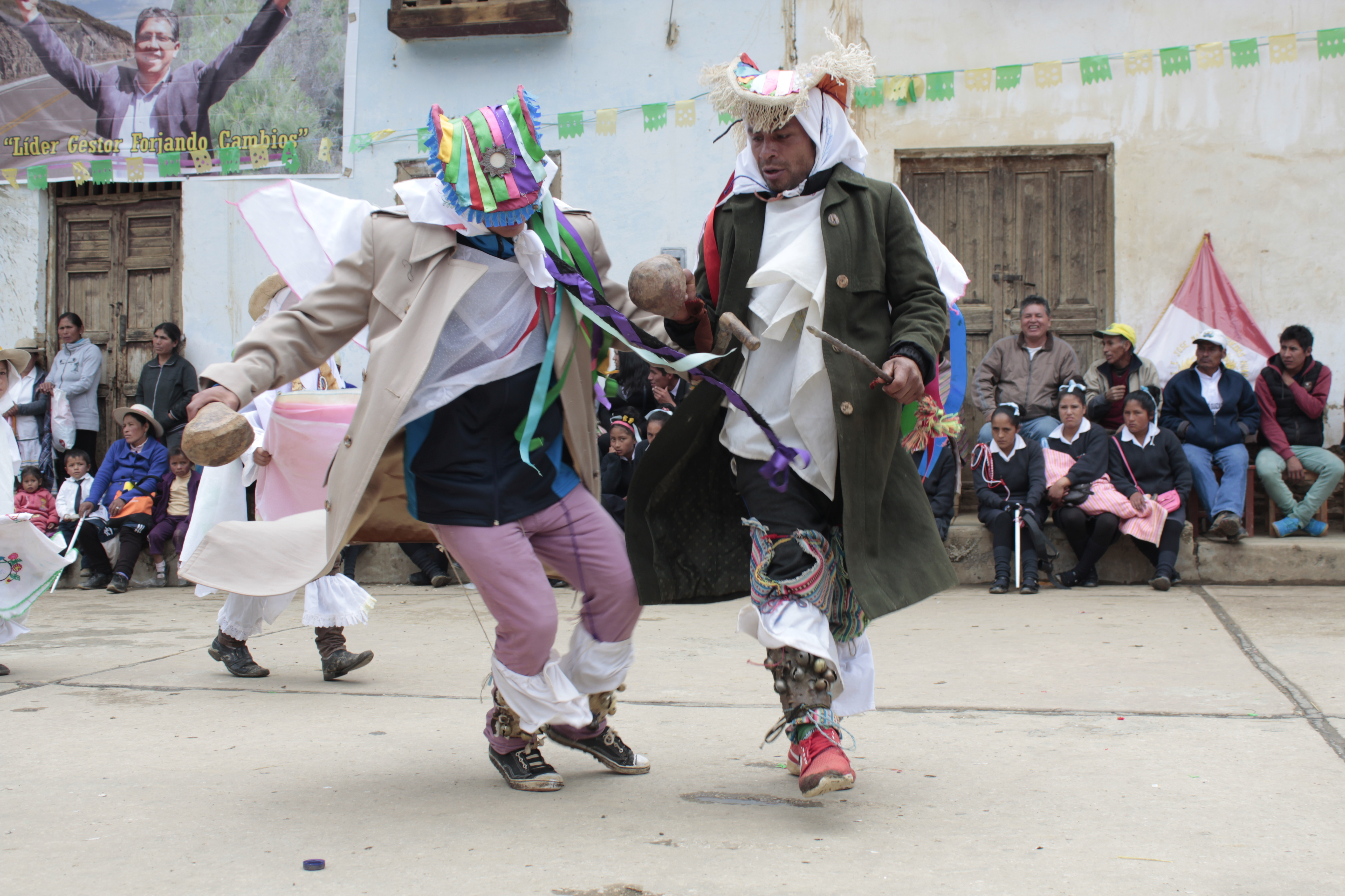 Danzas rapayanas.